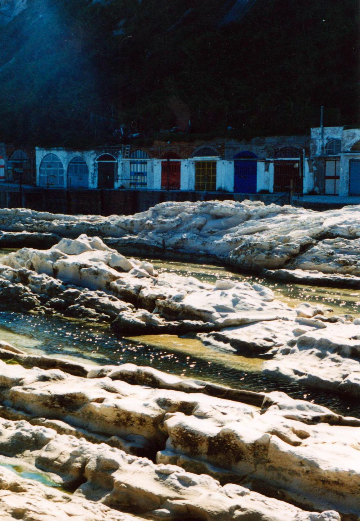 La foto è stata scattata in Ancona, nella spiaggia del Passetto; presenta in primo piano alcuni scogli e specchi d'acqua, in secondo piano si notano le grotte scavate dai pescatori alla base della rupe nel periodo compreso tra la metà dell'Ottocento e la metà del Novecento.